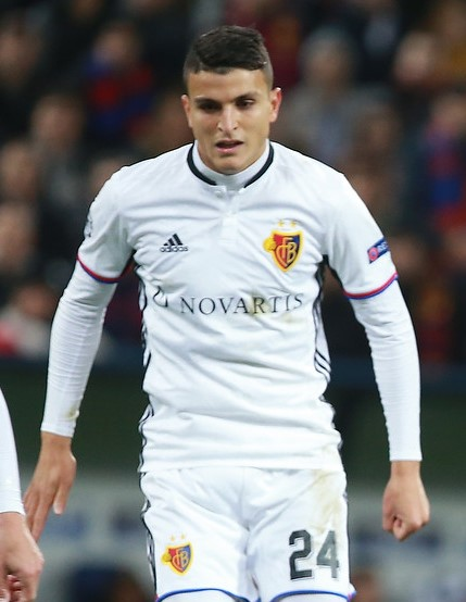 Mohamed Elyounoussi